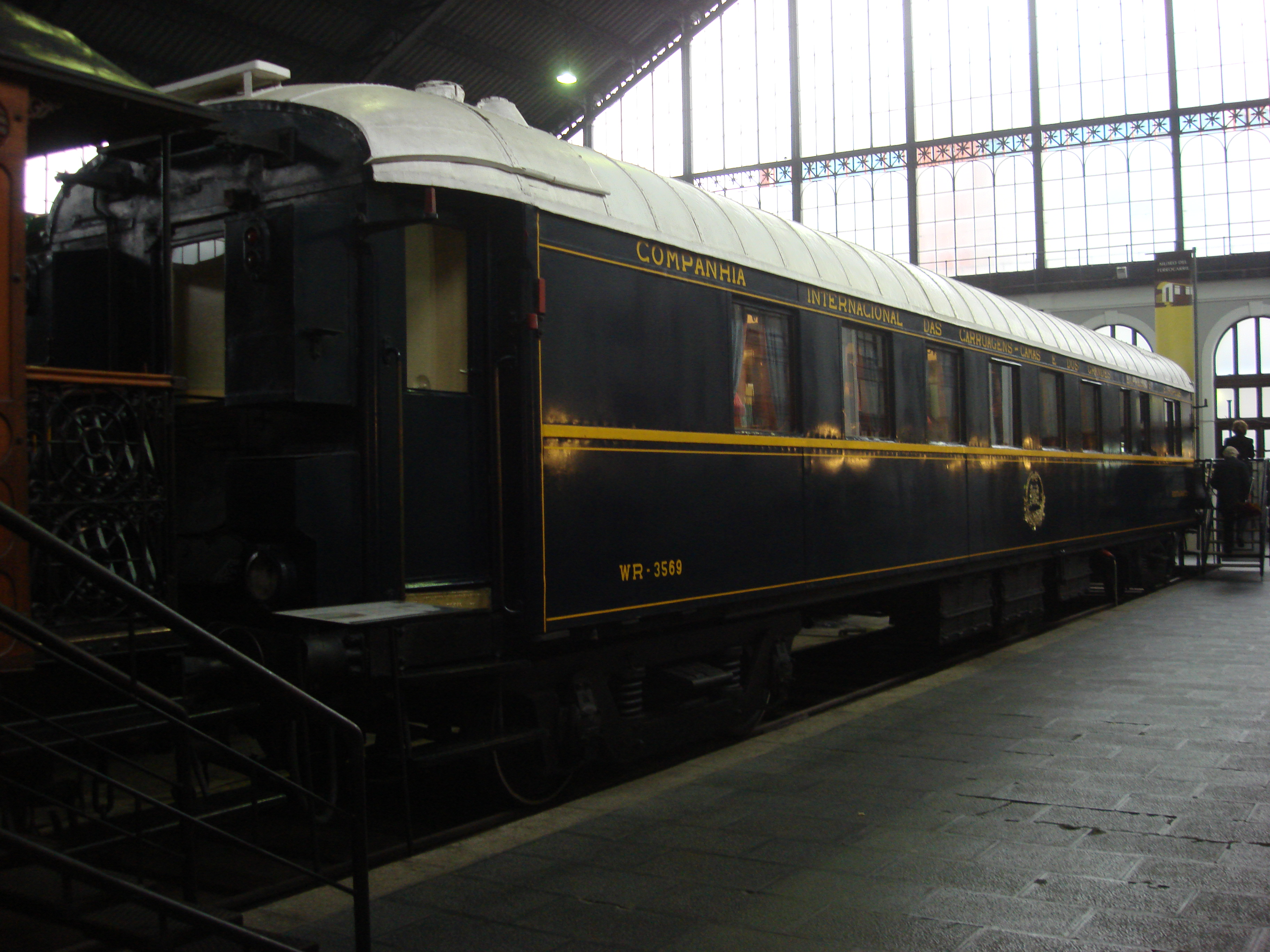 Own work